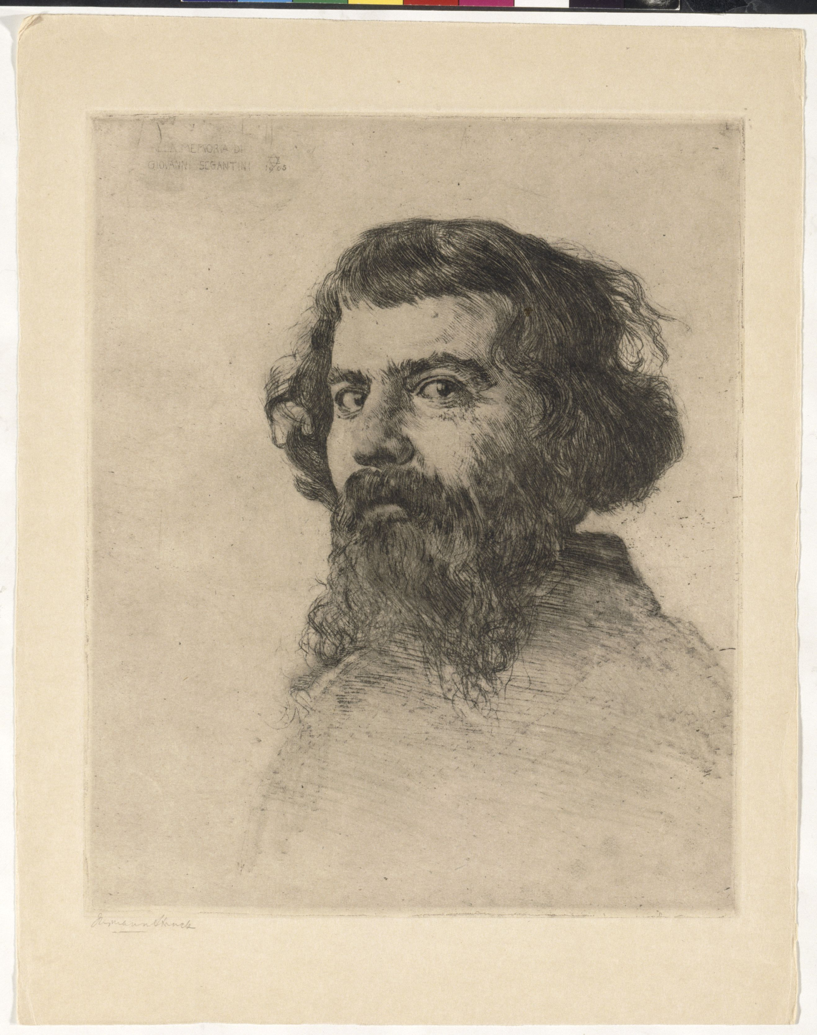 Artwork by Hermann StruckDargestellte Person: Segantini, Giovanni (15.1.1858 - 28.9.1899), DNB-LinkDatierung Display: 1905Objektart: RadierungSchlagworte Inhalt /Geografie: Mann, PorträtSchlagworte Kontext: Maler, Gedenken